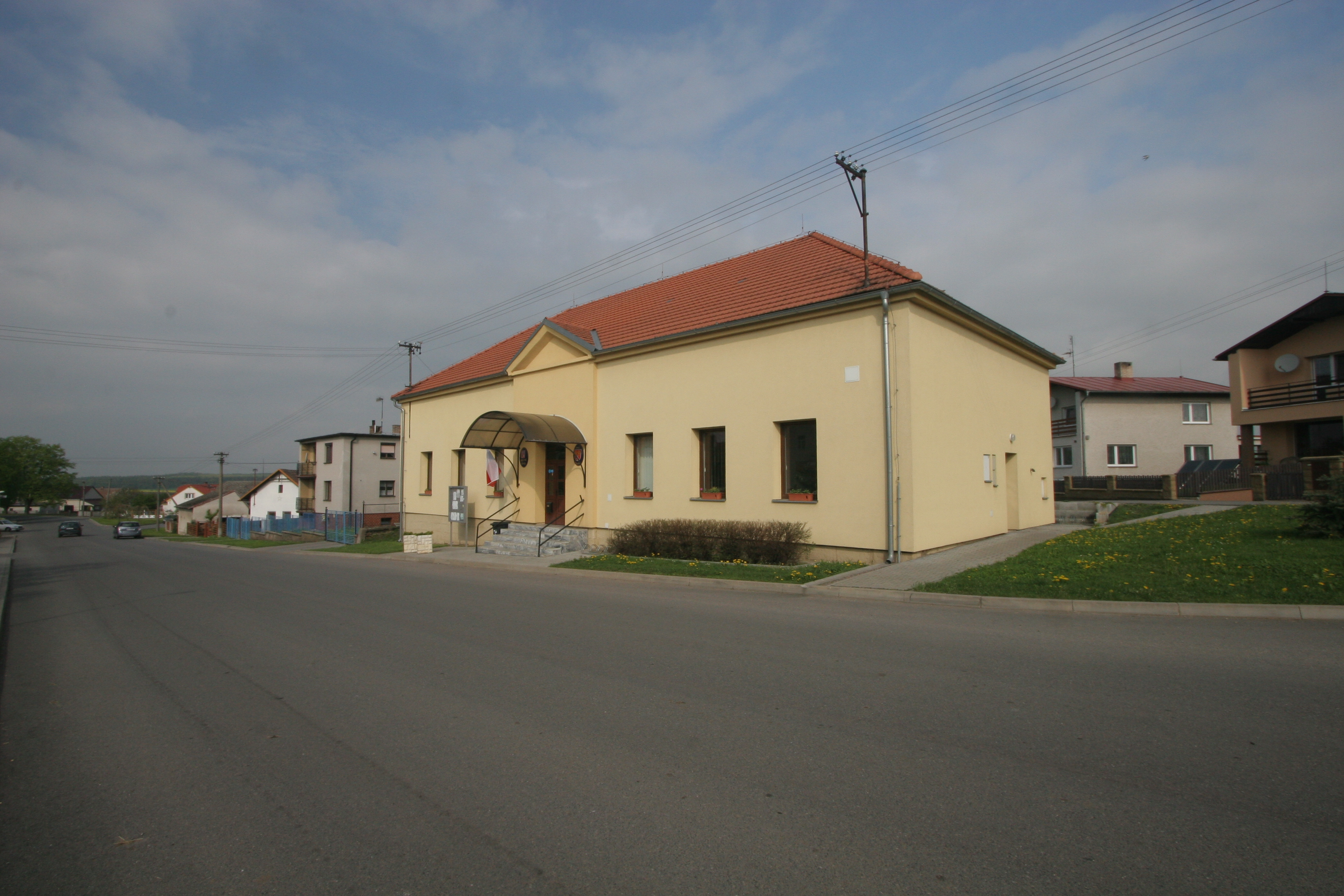 Chýšť obecní úřad